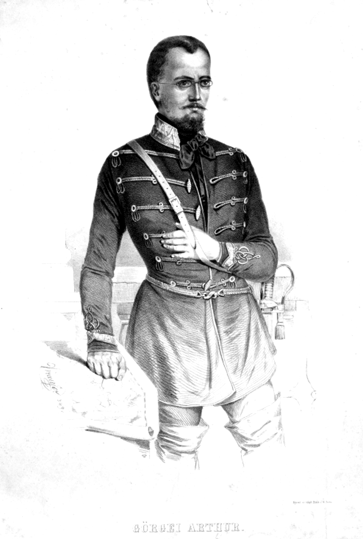 Görgői és toporci Görgey Artúr (Toporc, 1818. január 30. – Budapest, Lipótváros, 1916. május 21.) 1848–49-es honvédtábornok, hadügyminiszter, az 1848–49-es forradalom és szabadságharc idején több alkalommal a honvédsereg fővezére.